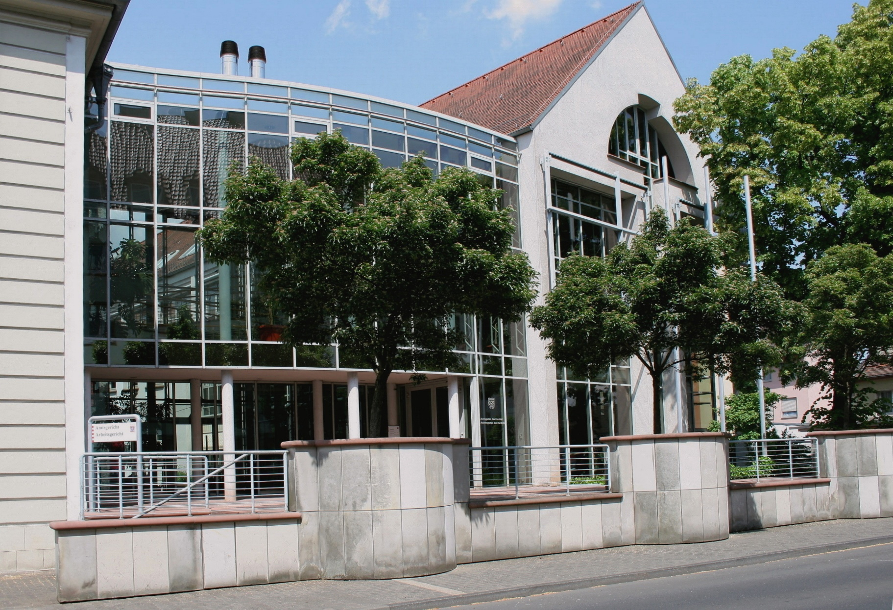 Amtsgericht und ehemaliges Arbeitsgericht Bad Hersfeld (neuer Anbau) in Bad Hersfeld.